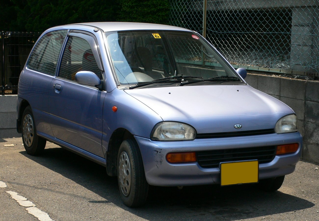 Subaru_Vivio (1992 - 1994)